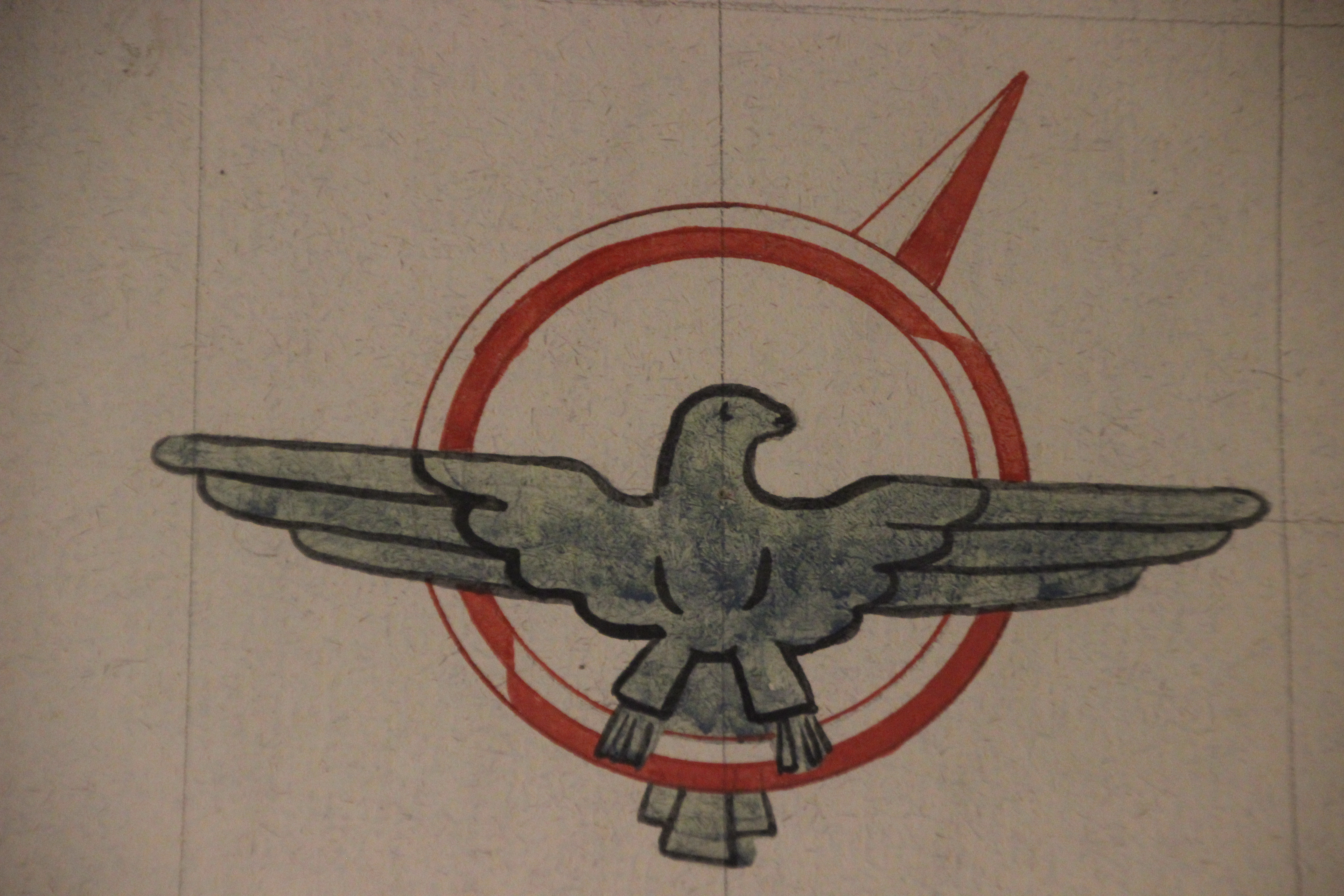 Logo de l'aigle impérial - coupole plan de Rome